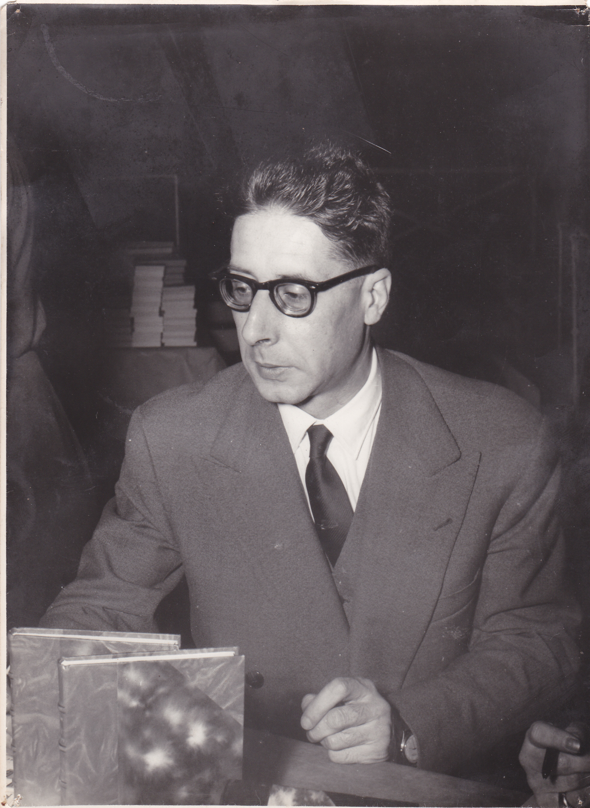 L'écrivain Pierre Gamarra à Paris en 1953 Unknown